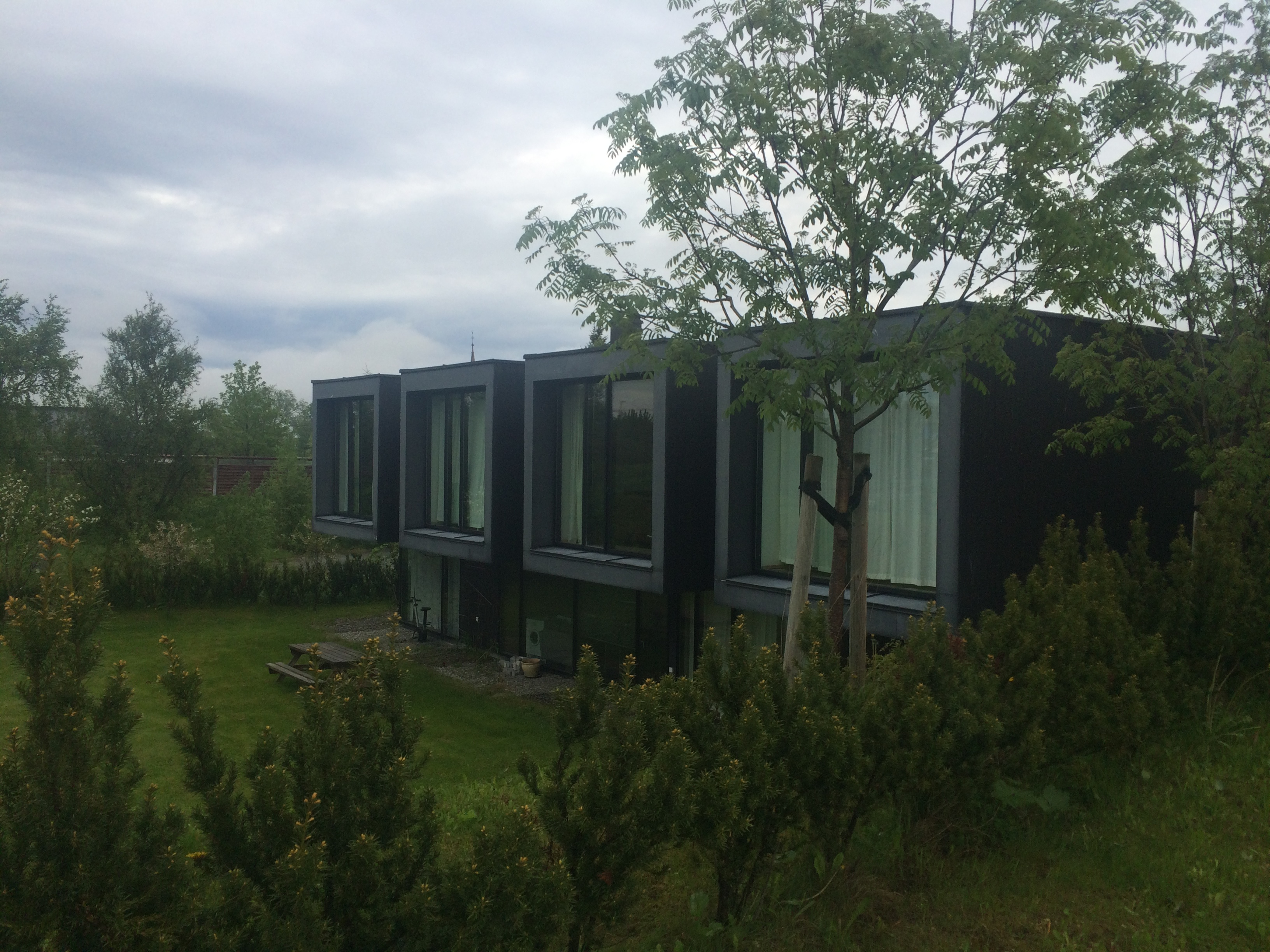 "Veiskillet", arkitekt Bård Helland. Boliger for bostedsløse. Trondheim. Vant Houens fonds diplom i 2012